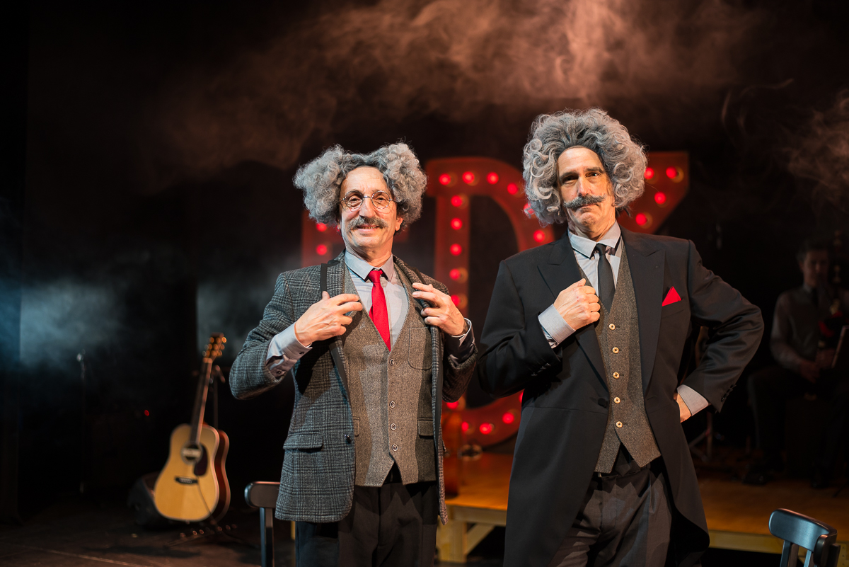 Mikel Martinez eta Patxo Telleria aktoreak Ez Dok Hiru obra errepresentatzen.